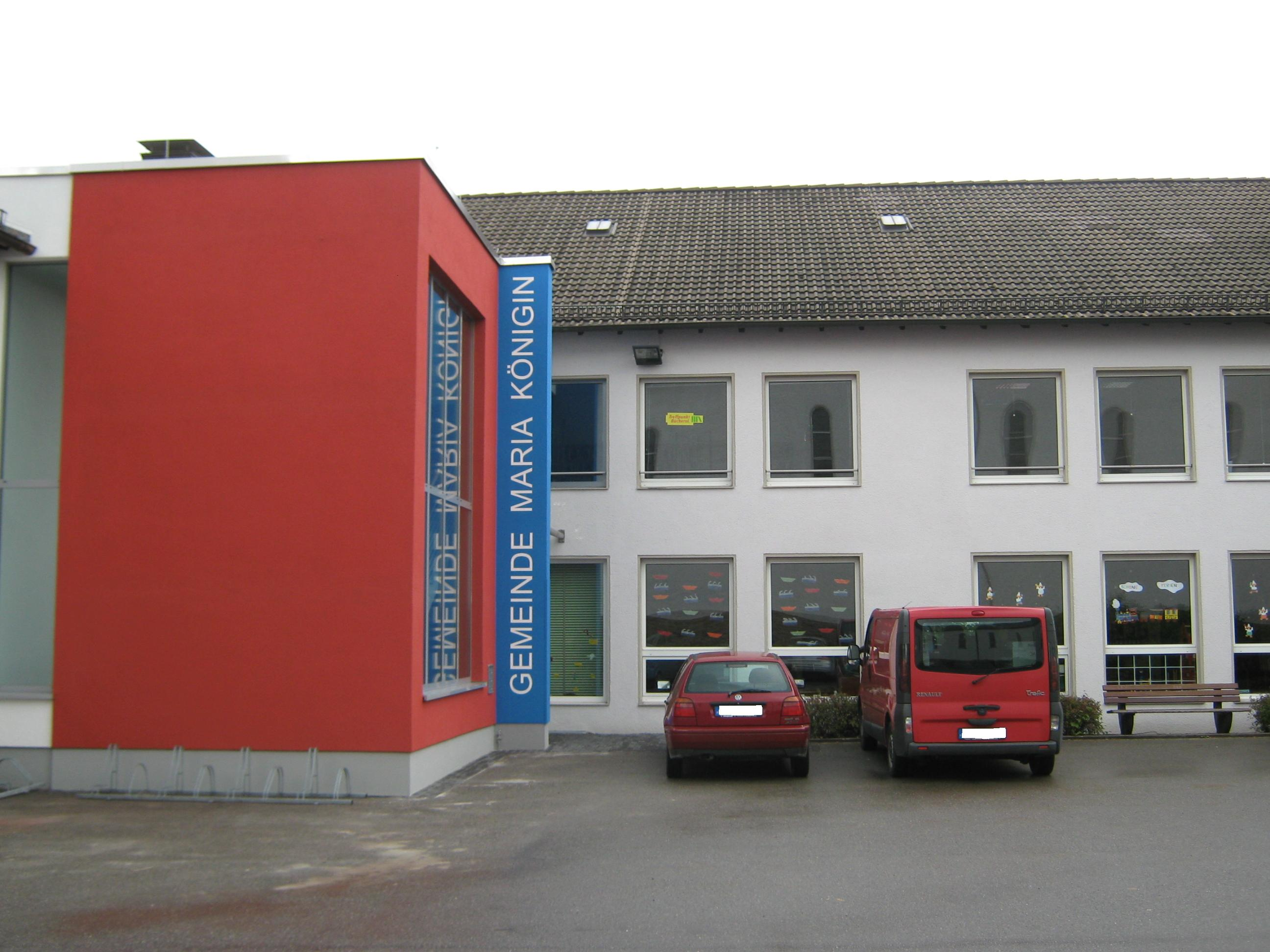 Das renovierte Gemeindezentrum der Gemeinde Maria Königin. Unten rechts ist die KiTa beheimatet. Oben ist der große Gemeindesaal.